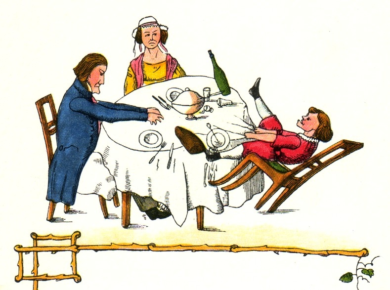 Illustration “Zappelphilipp” aus dem Struwwelpeter